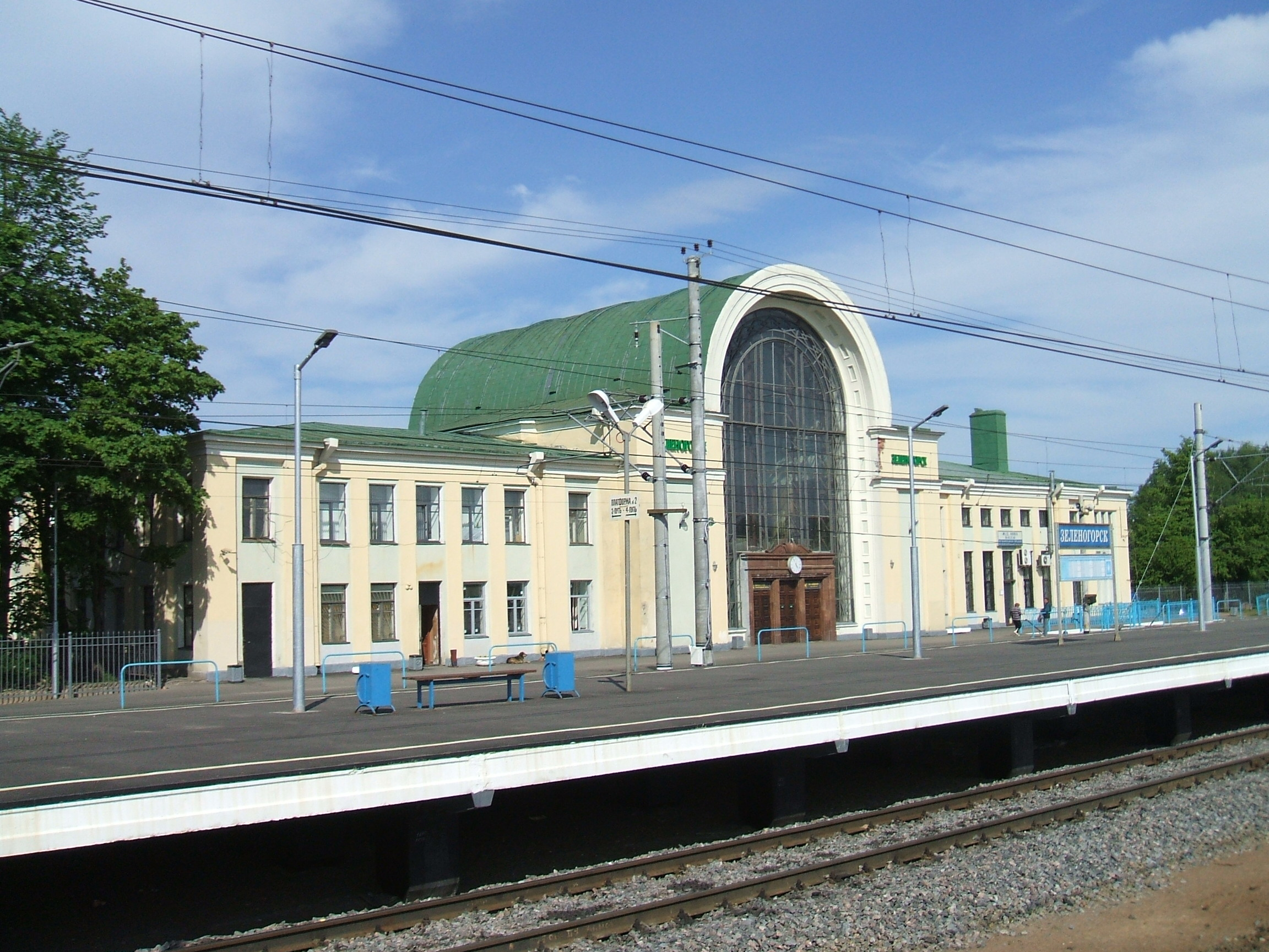 Здание вокзала в Зеленогорске СПб